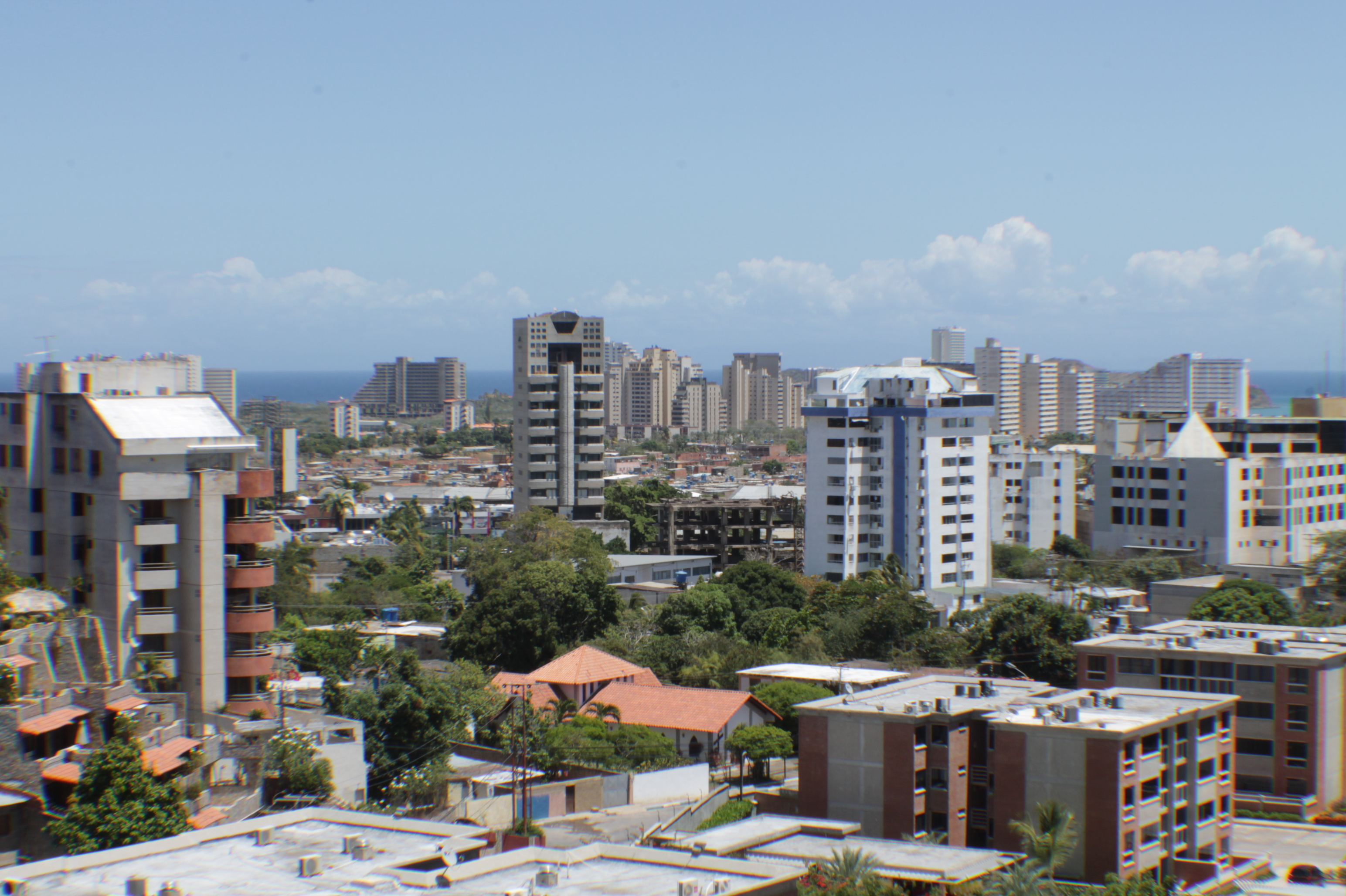 Porlamar, Estado Nueva Esparta, Venezuela.